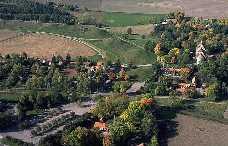 RAÄ-nr: Uppsala 123:1. Gamla Uppsala kyrka och Kungshögarna. Motiv: Gamla Uppsala Nyckelord: Flygbilder, Raä-Fastigheter, Riksintressen Kategori: Hög RAÄ-nr: Uppsala 123:1. Gamla Uppsala kyrka och Kungshögarna.